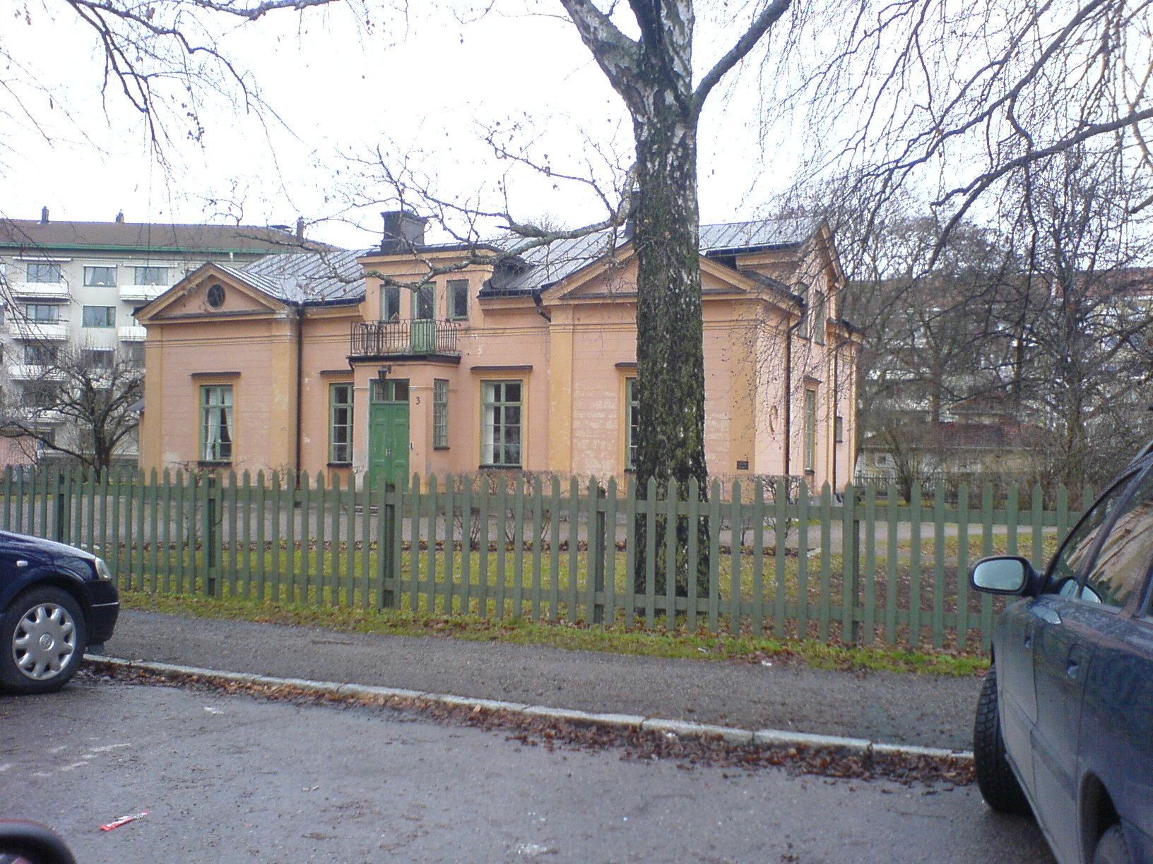 houses, uppsala - vasaparken / katedralskolan